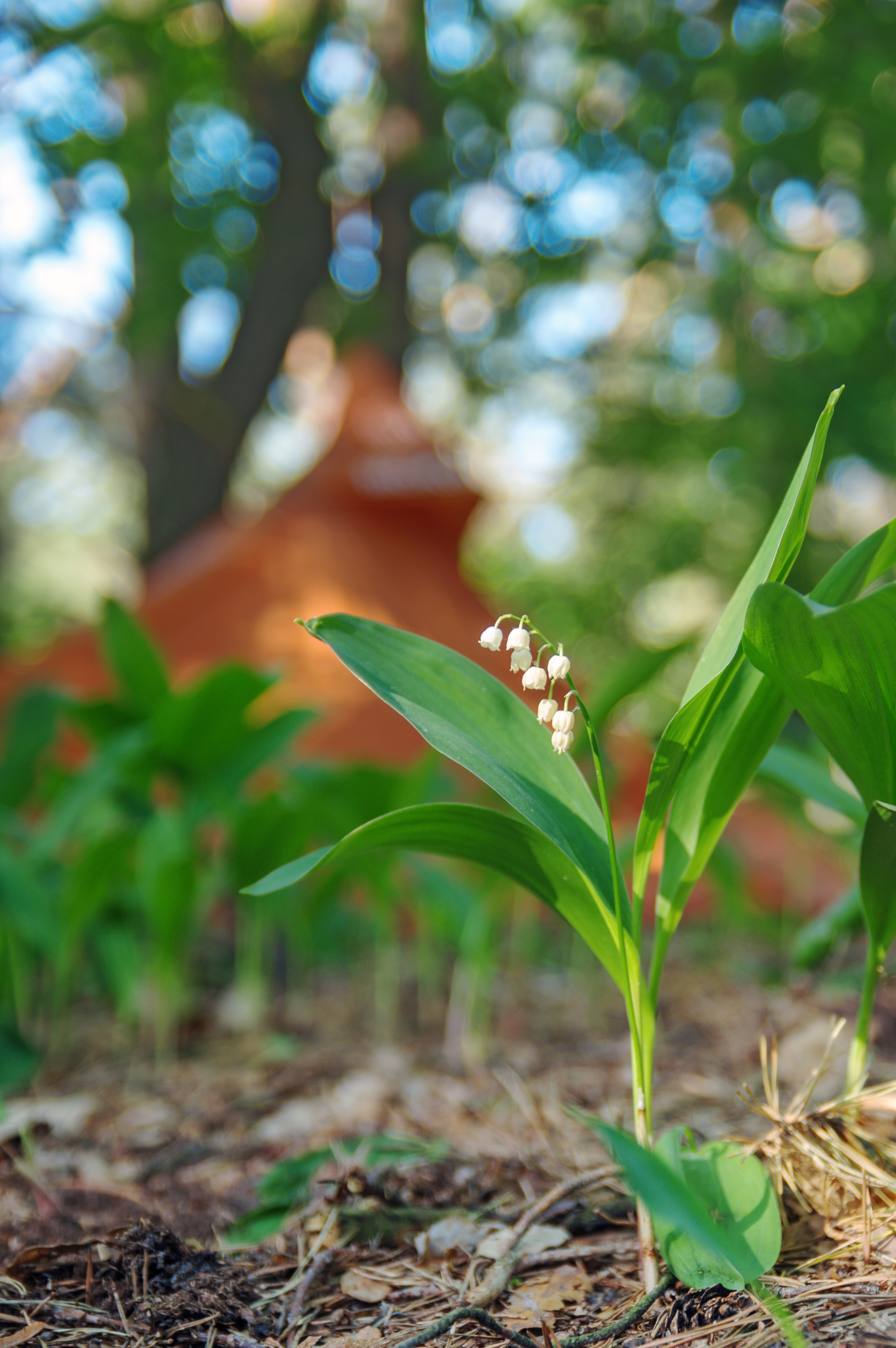 Лісники, Голосіївський район